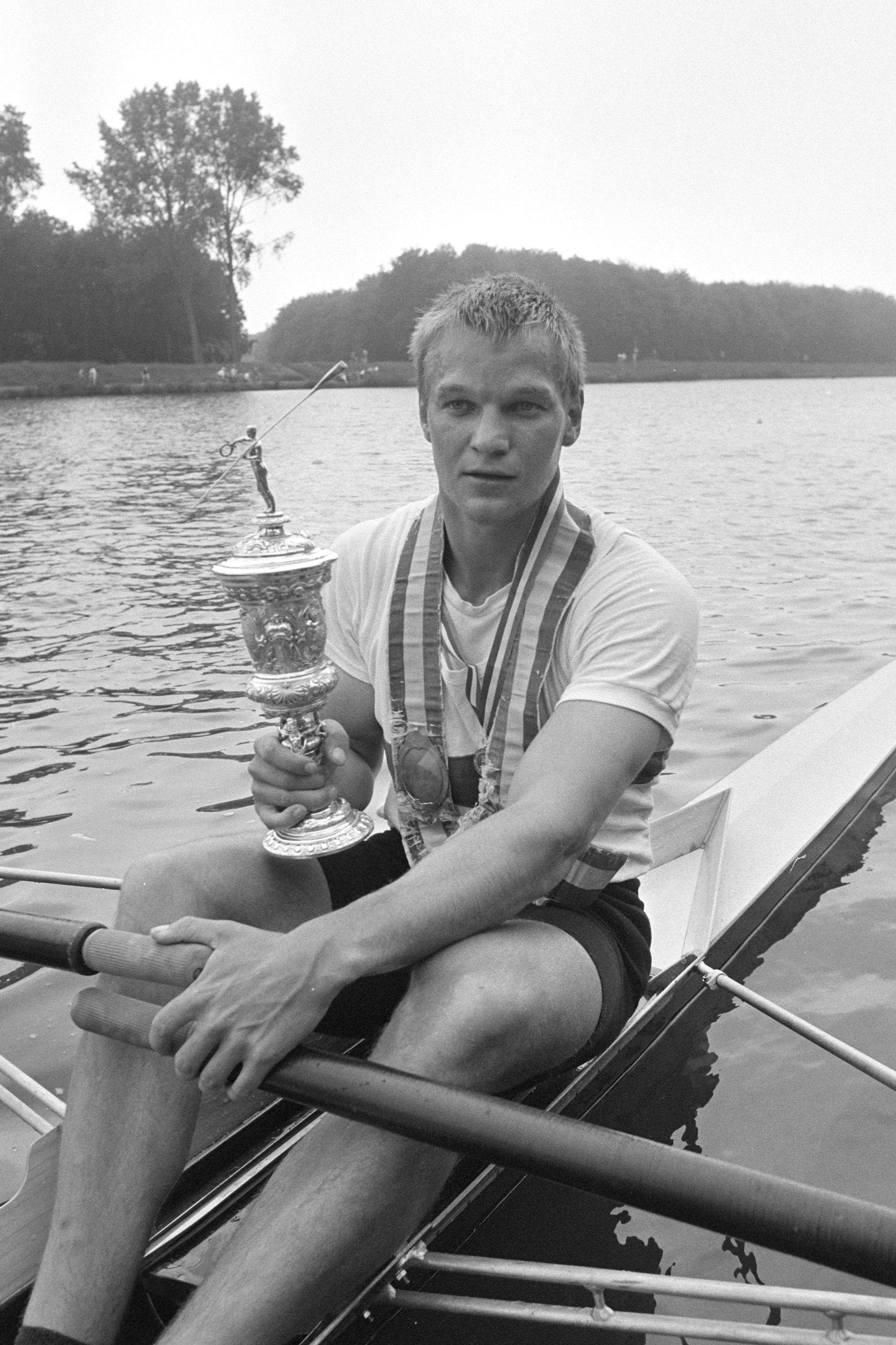 Roeien, Kon. Hollandbeker ; winnaar Thomas Lange met beker